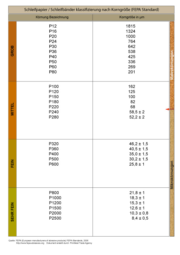 Schleifpapier oder Schleifbänder Klassifizierung nach Korngröße